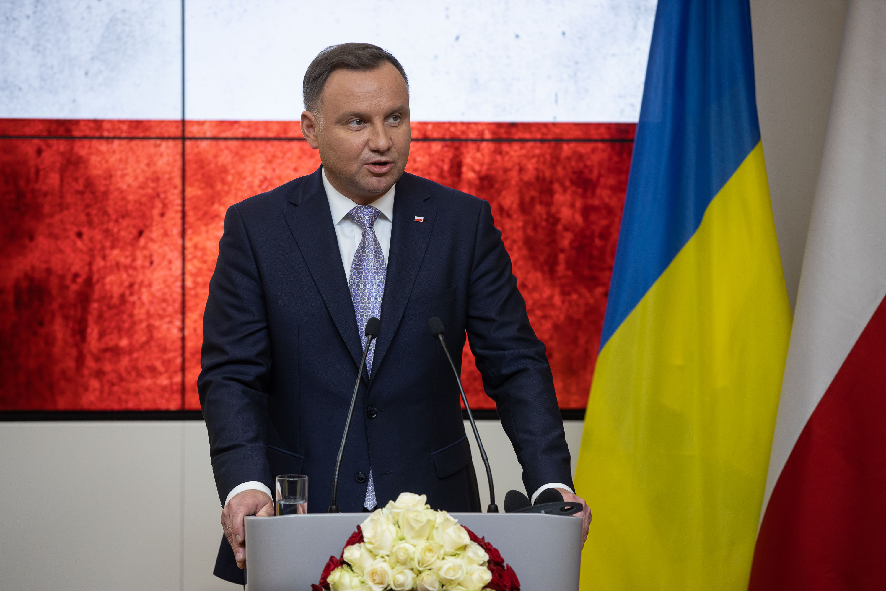 Визит Президента Украины в институты ЕС и НАТО в Брюсселе